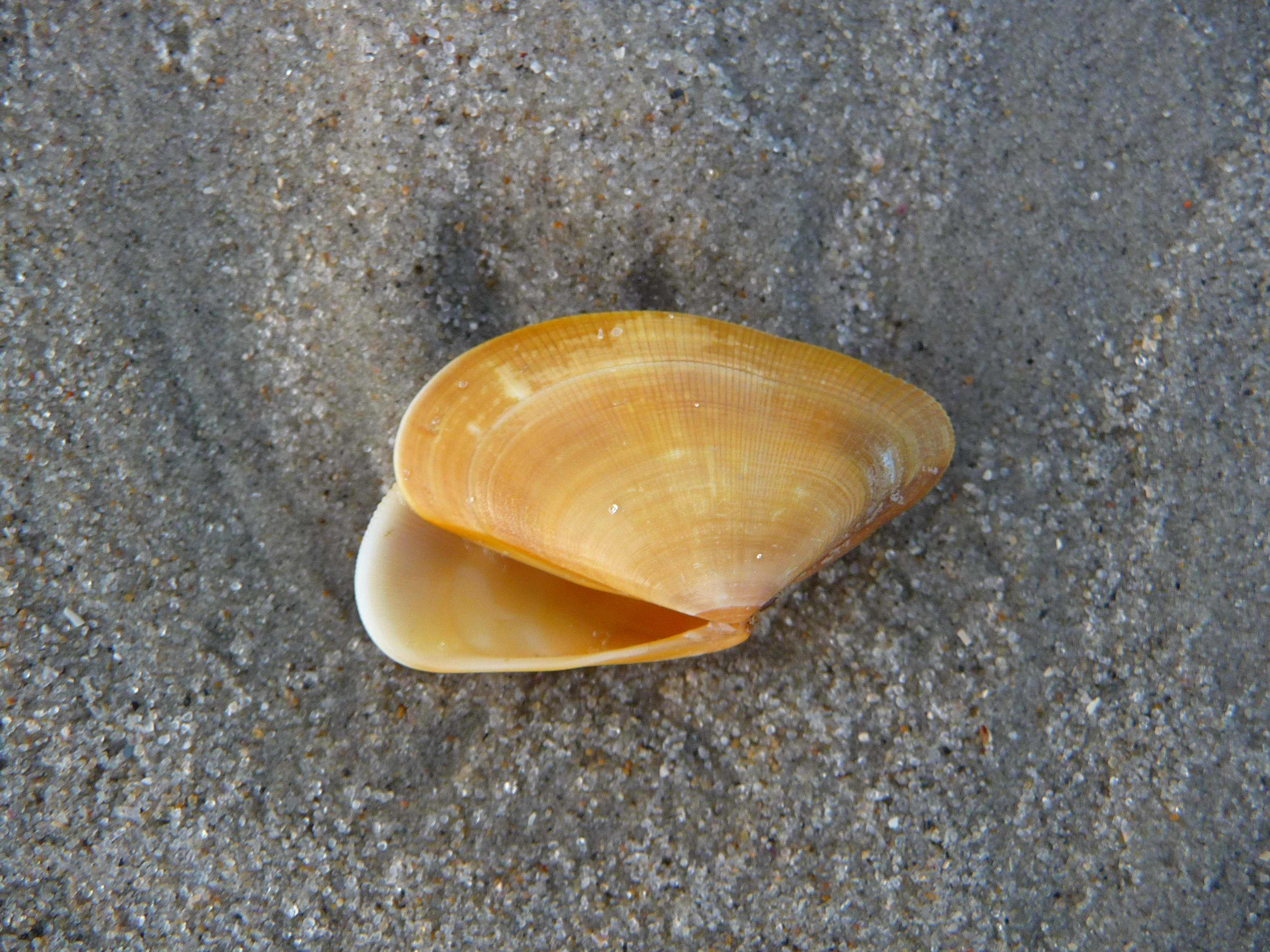 Schalen des Sägezähnchens (Donax vitattus), fotografiert im Watt vor der ostfriesischen Nordseeinsel Juist (Niedersachsen, Deutschland)